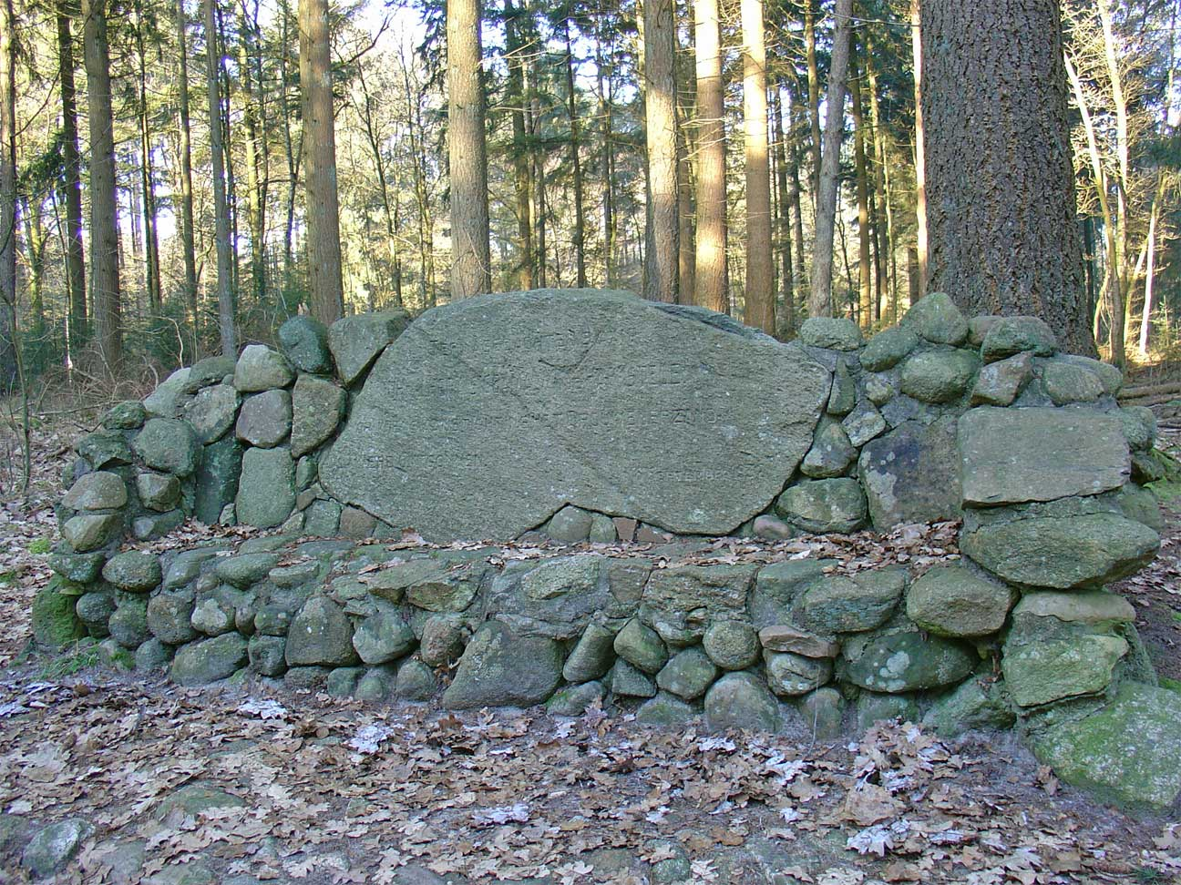 "Hora-Siccamabank" ter herhinnering aan jhr Hora Siccama van Harkstede, oprichter van de Oranjebond. De tekst op de bank luidt: "Ter nagedachtenis aan Jhr. J. Hora Siccama van de Harkstede op wiens aanstichting het Drouwenerzand werd ontgonnen"